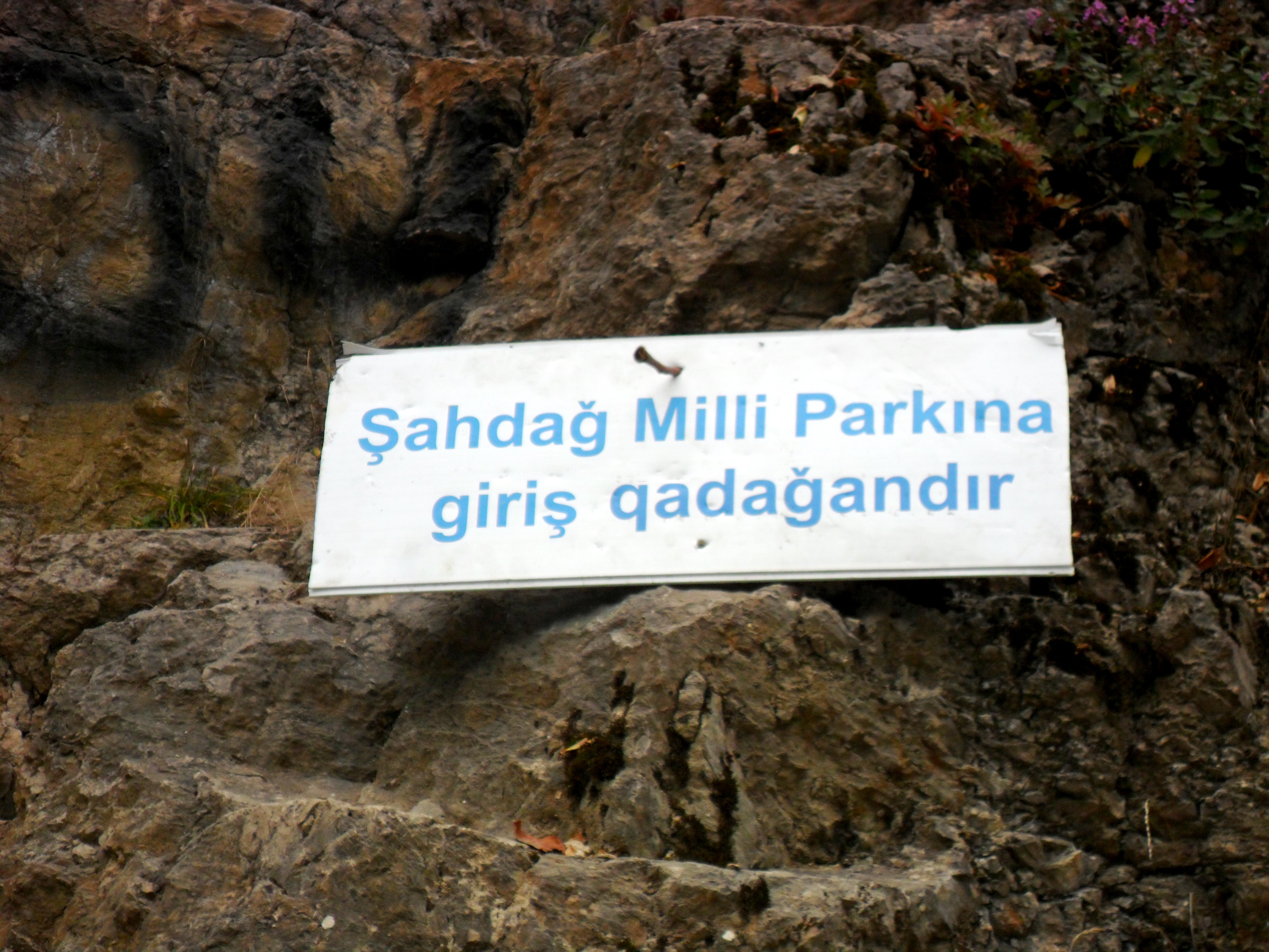 "Şahdağ Milli Parkına giriş qadağandır" lövhəsi